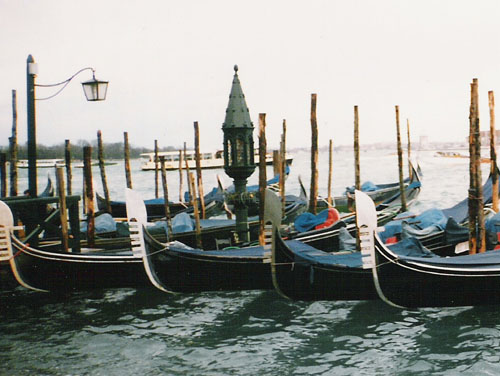 Gondlid